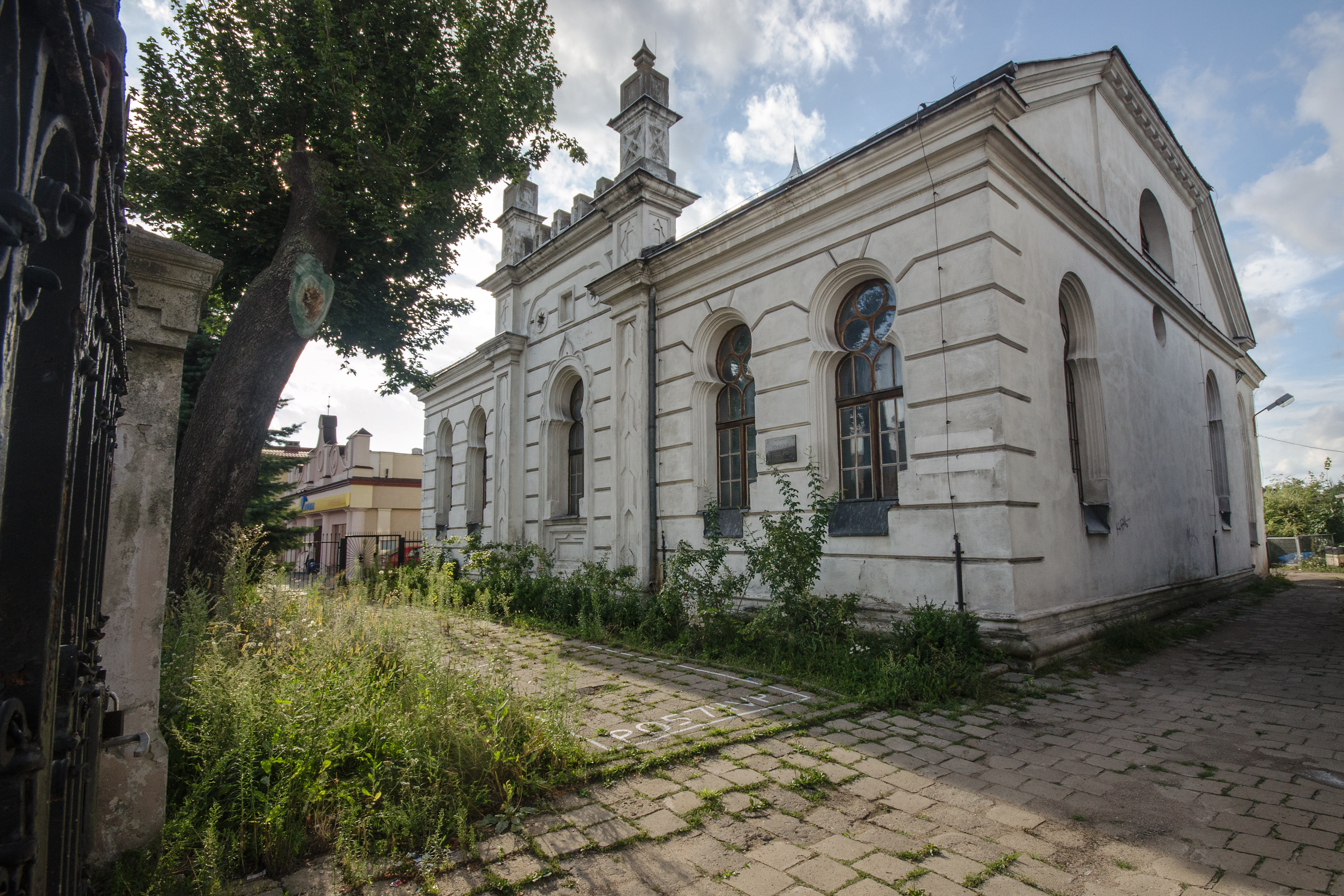 Konin, synagoga, ob. biblioteka, 1832, 1883, 1966